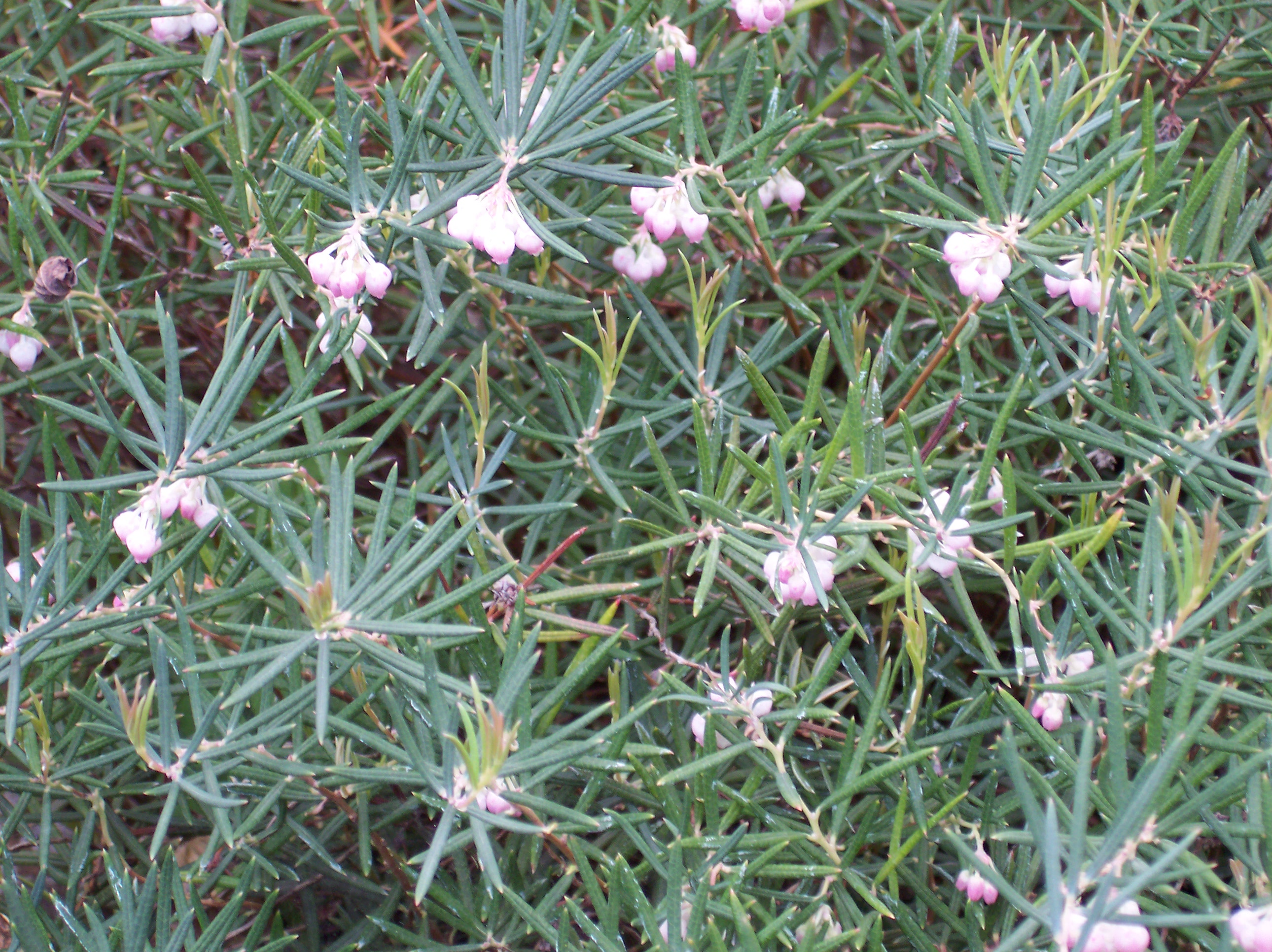 Andromeda polyfolia. Real Jardín Botánico, Madrid.